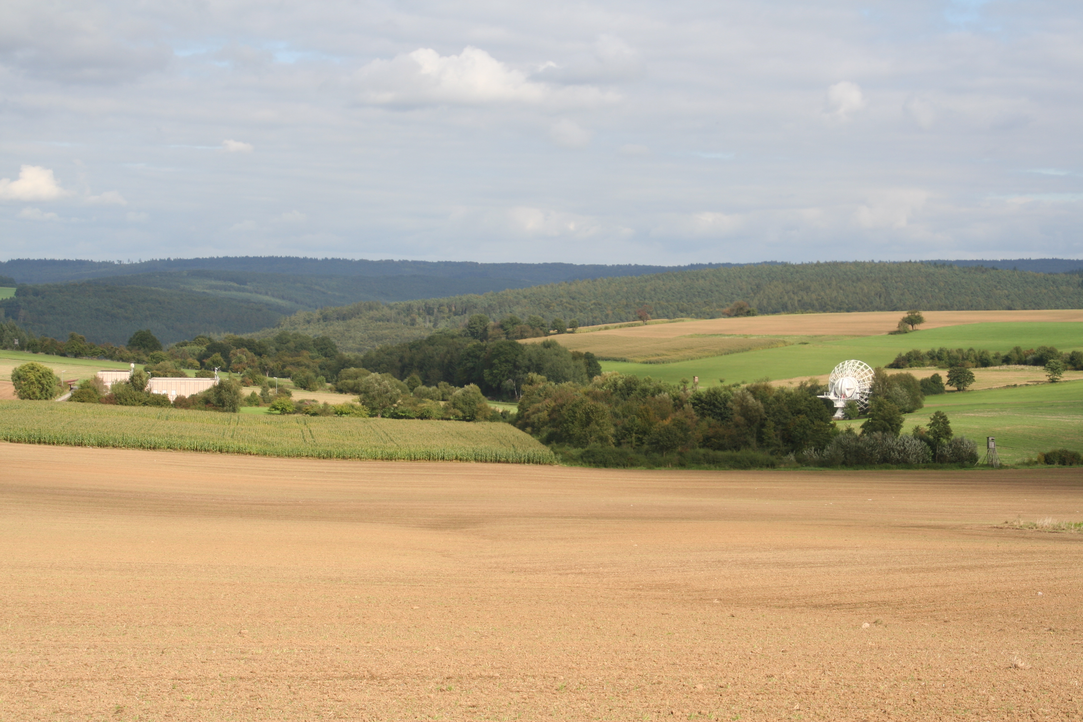 Die einzige verbliebene Parabolantenne der ESOC-Bodenstation Michelstadt und das Hauptgebäude